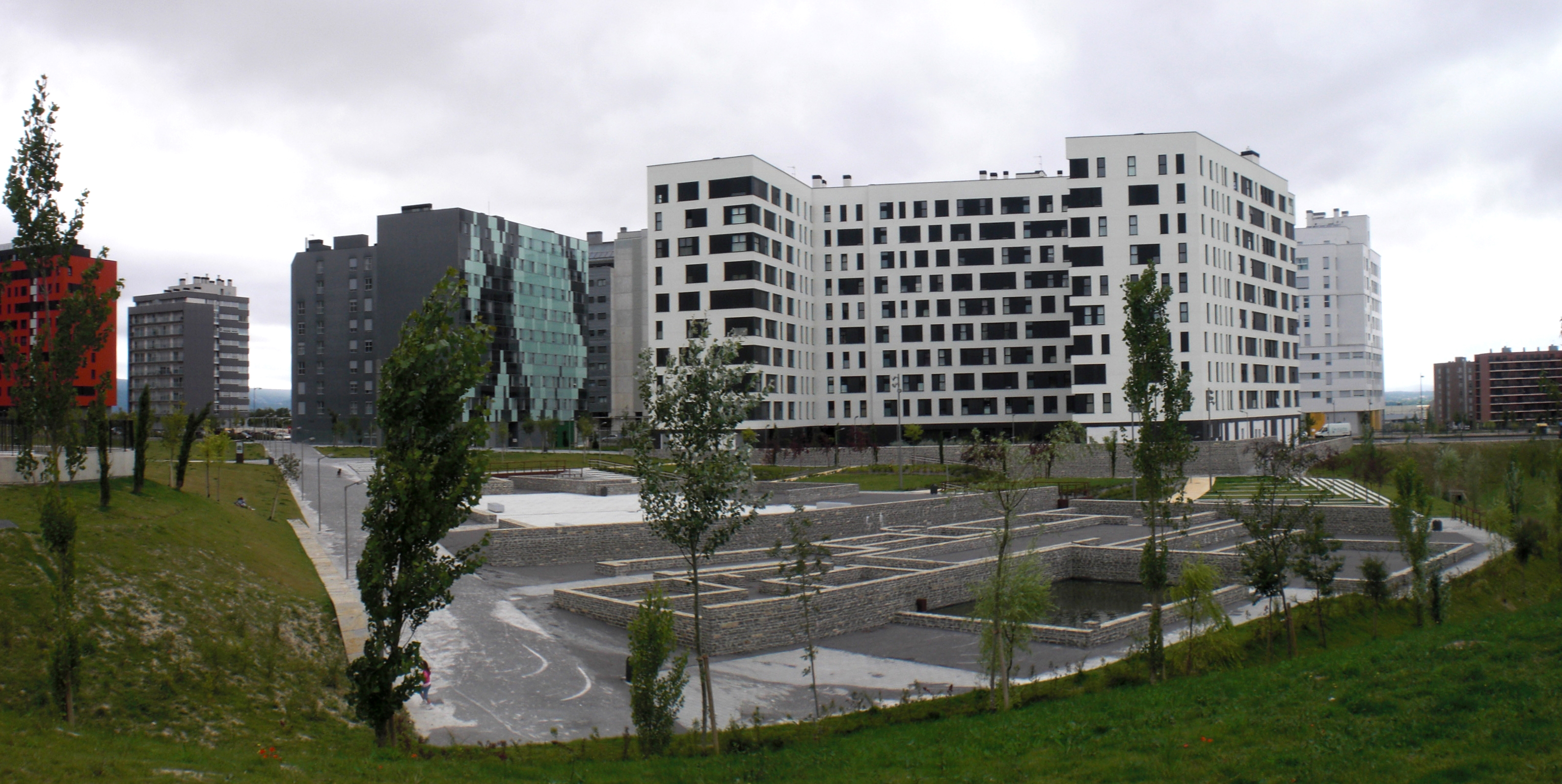 Mariturriko aztarnategia